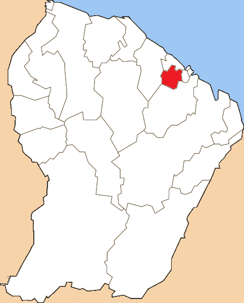 Situation du canton dans le département de la Guyane